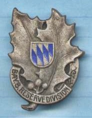 8. Bayerische Reserve-Infanterie-Division, Kappenabzeichen, 1917